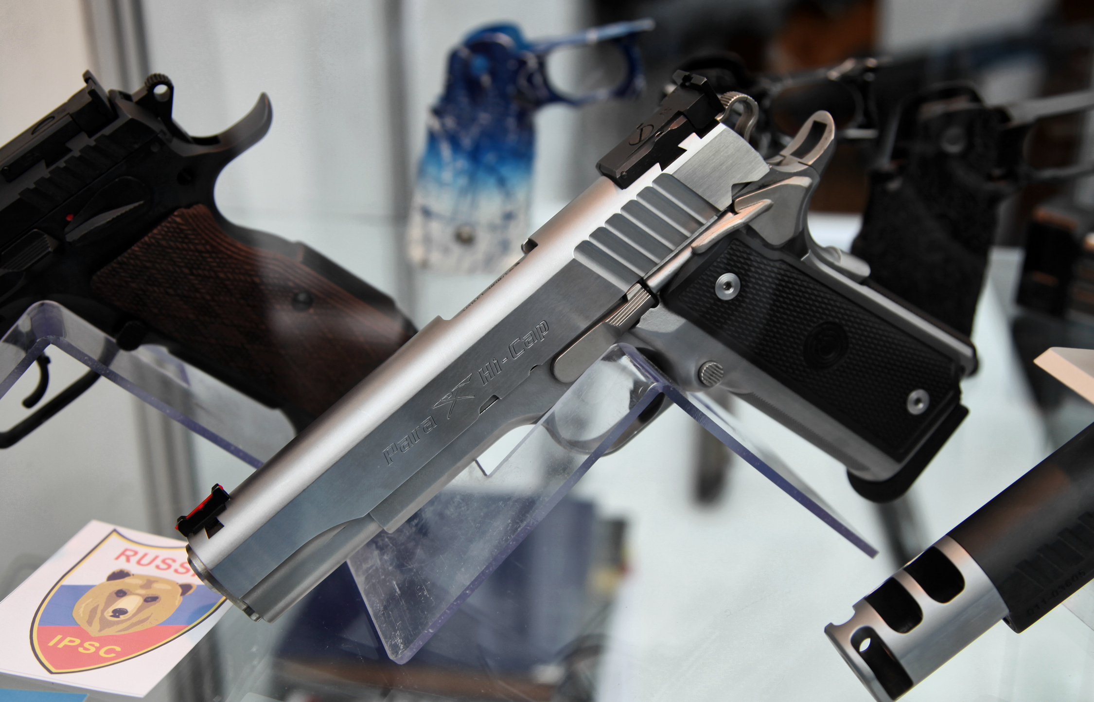 9x19 Para P18-9 Hicap